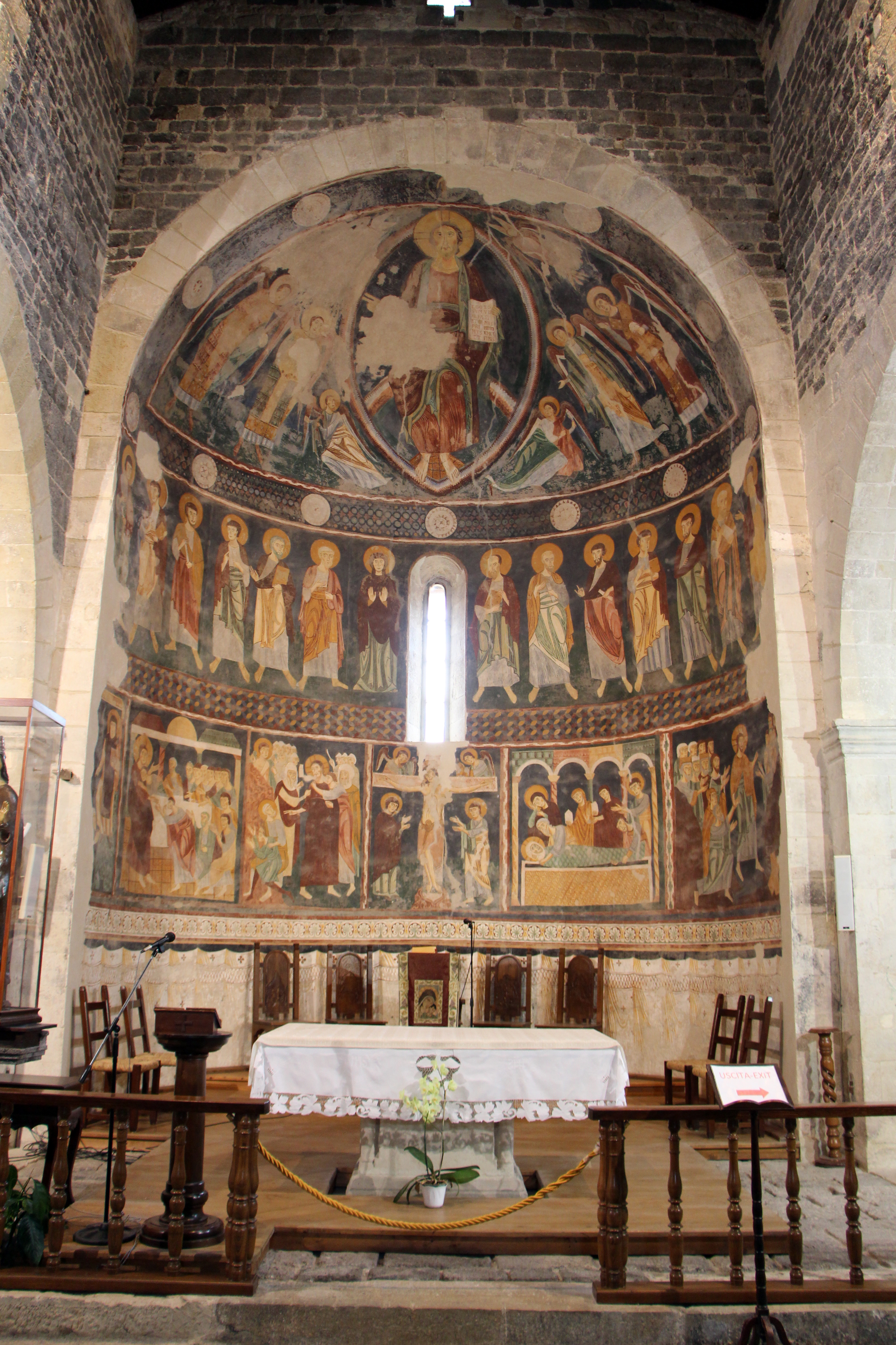 Codrongianos